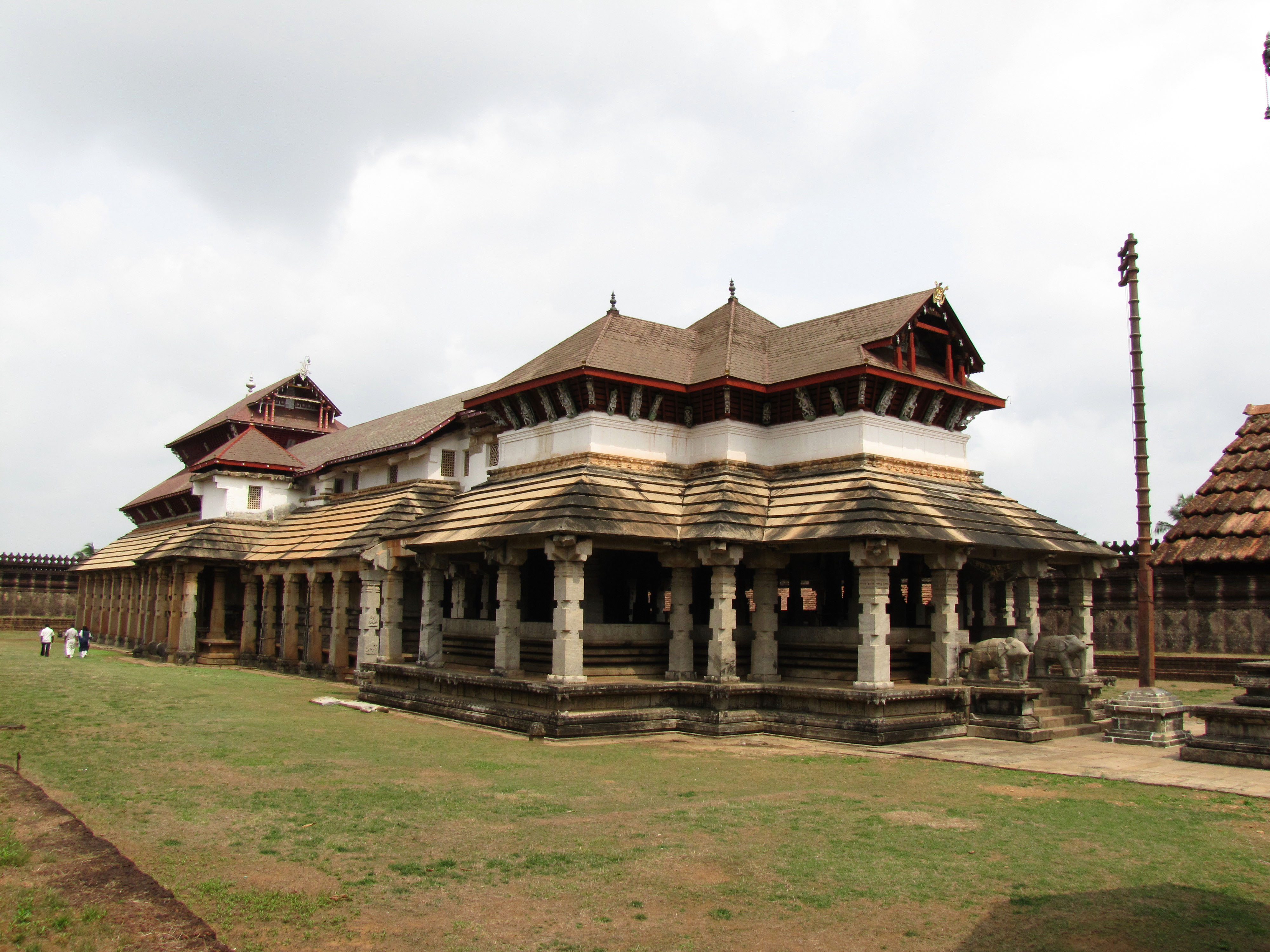 1000 Pillar Temple Moodbidri Left side view